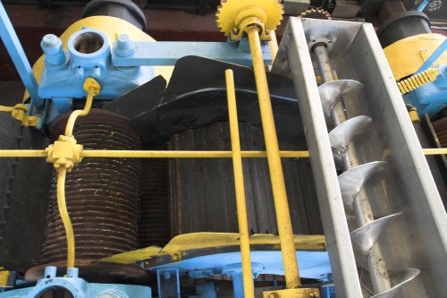 Moulins à canne dans la distillerie 3 rivieres (Martinique, France)